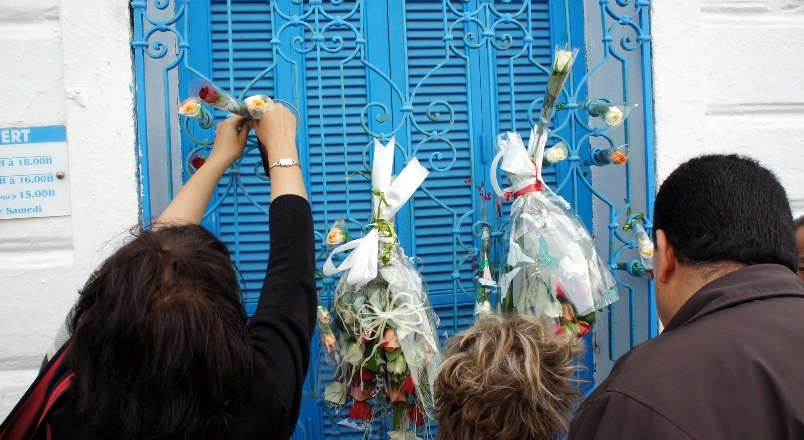 Hommage aux victimes du 11 avril 2002